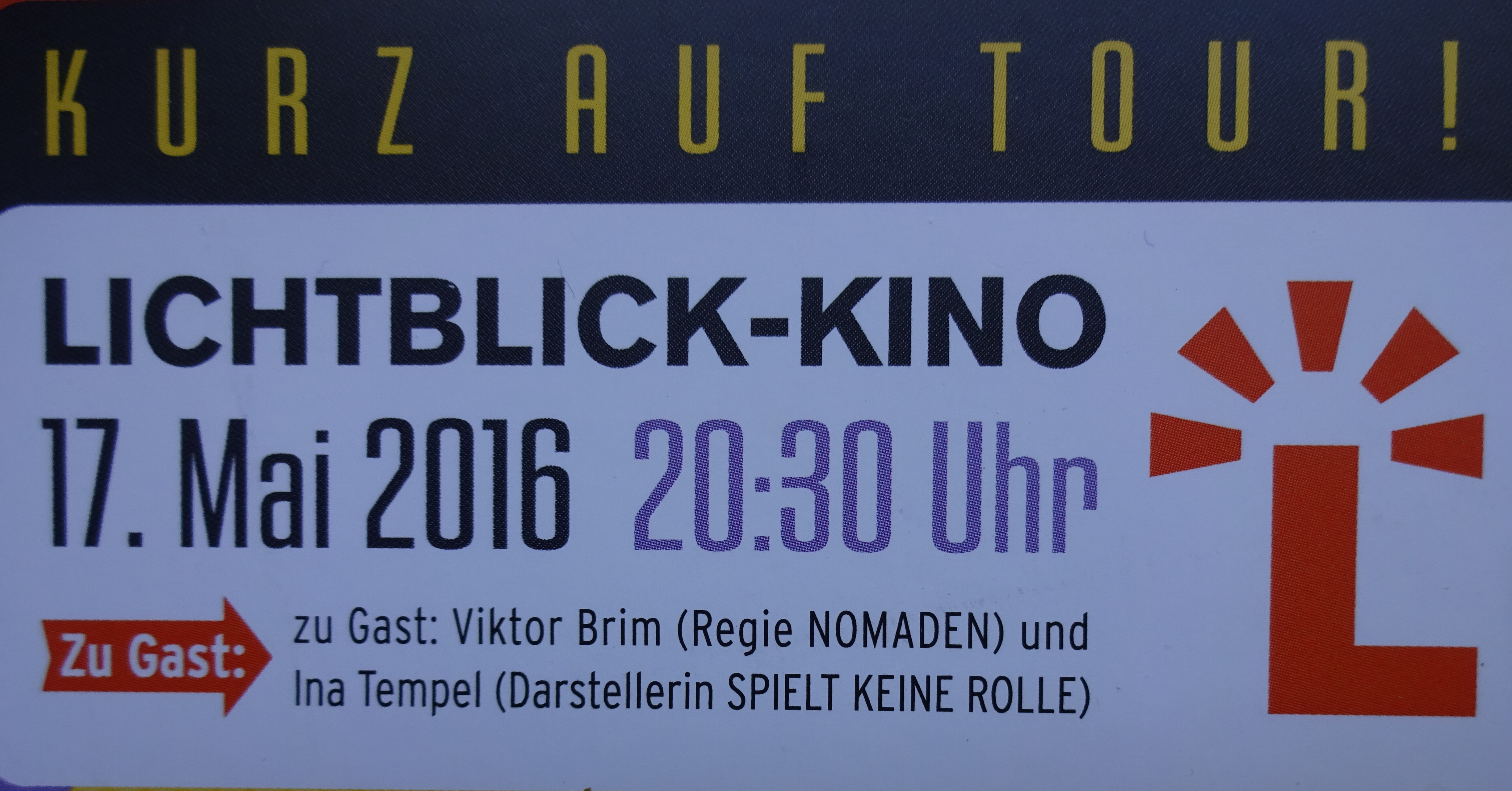 Ausschnitt aus einem Flyer,auf dem eine Vorführung im Lichtblick-Kino, Berlin, im Rahmen der Tournee der Kurzfilmpreisträger 2016 angekündigt wird.